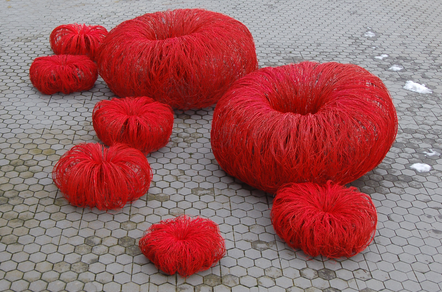 Instalace v plenéru